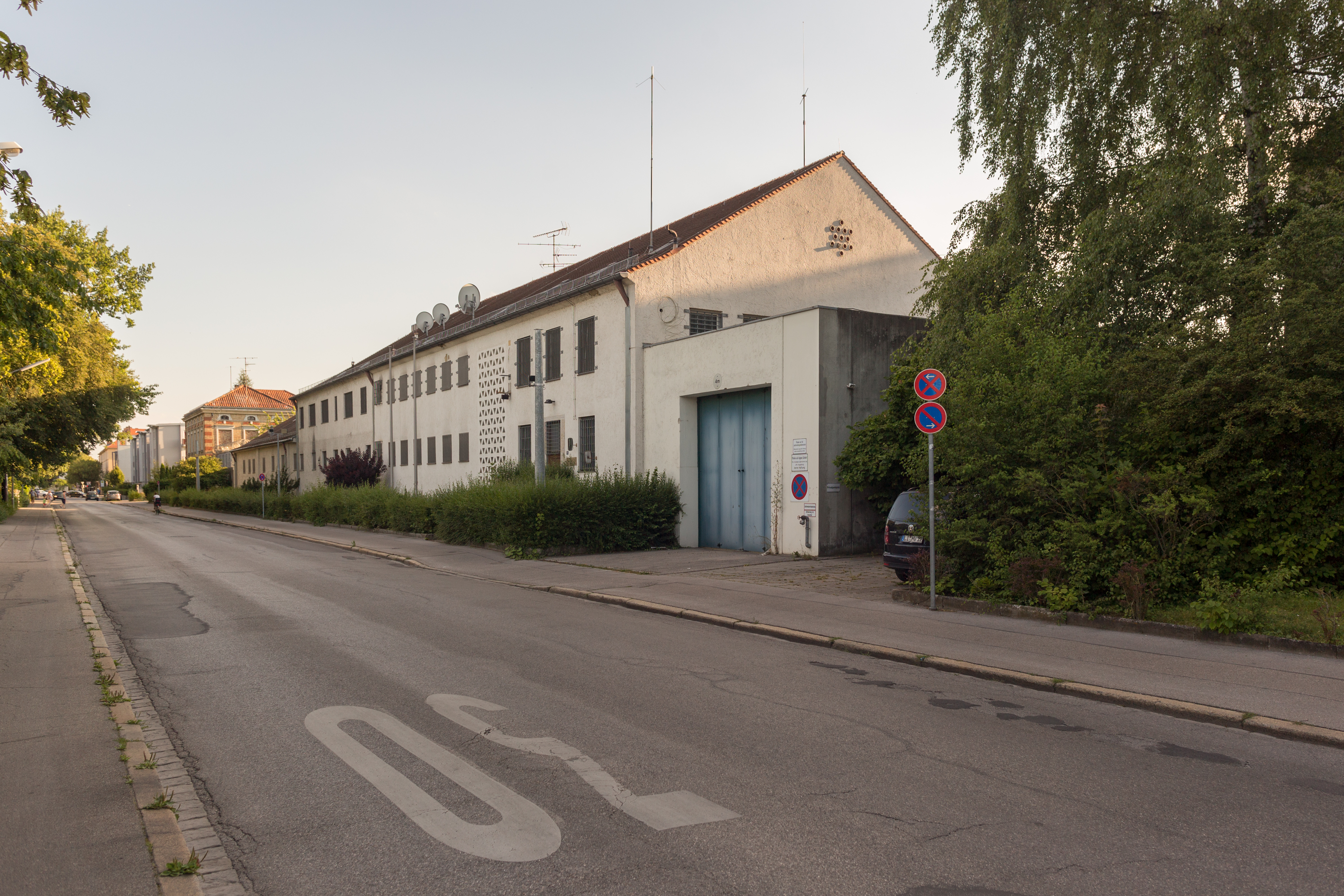 JVA Augsburg Institution II.